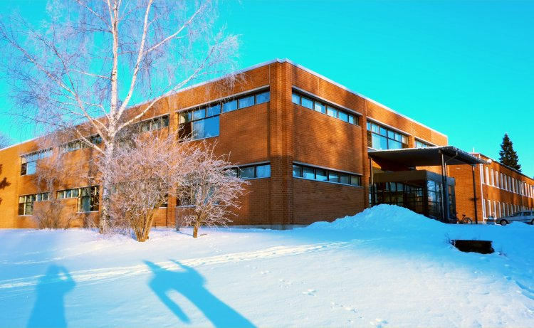 Kokemäen lukio